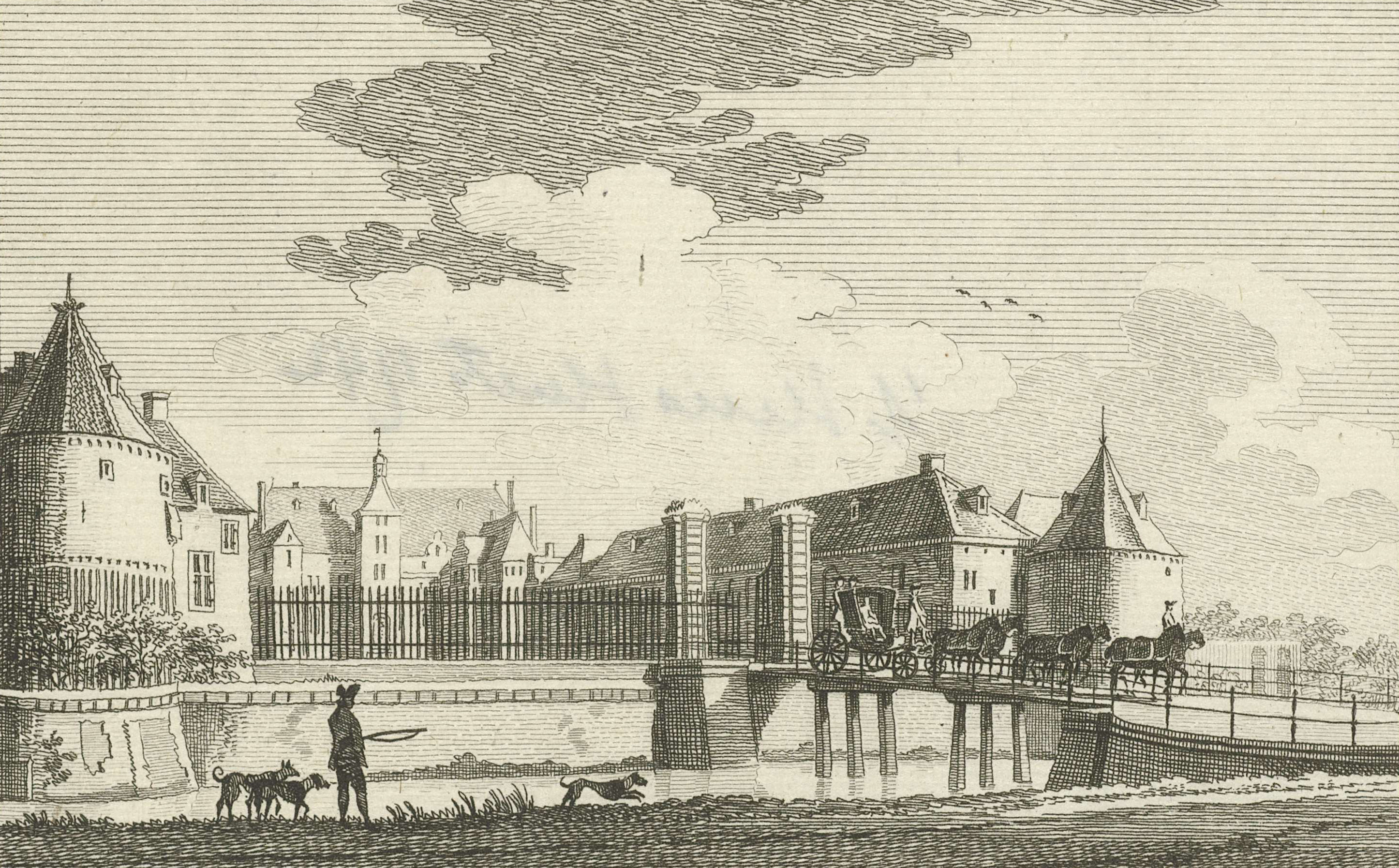 Stich mit der Abbildung des Schlosses Hueth in Rees